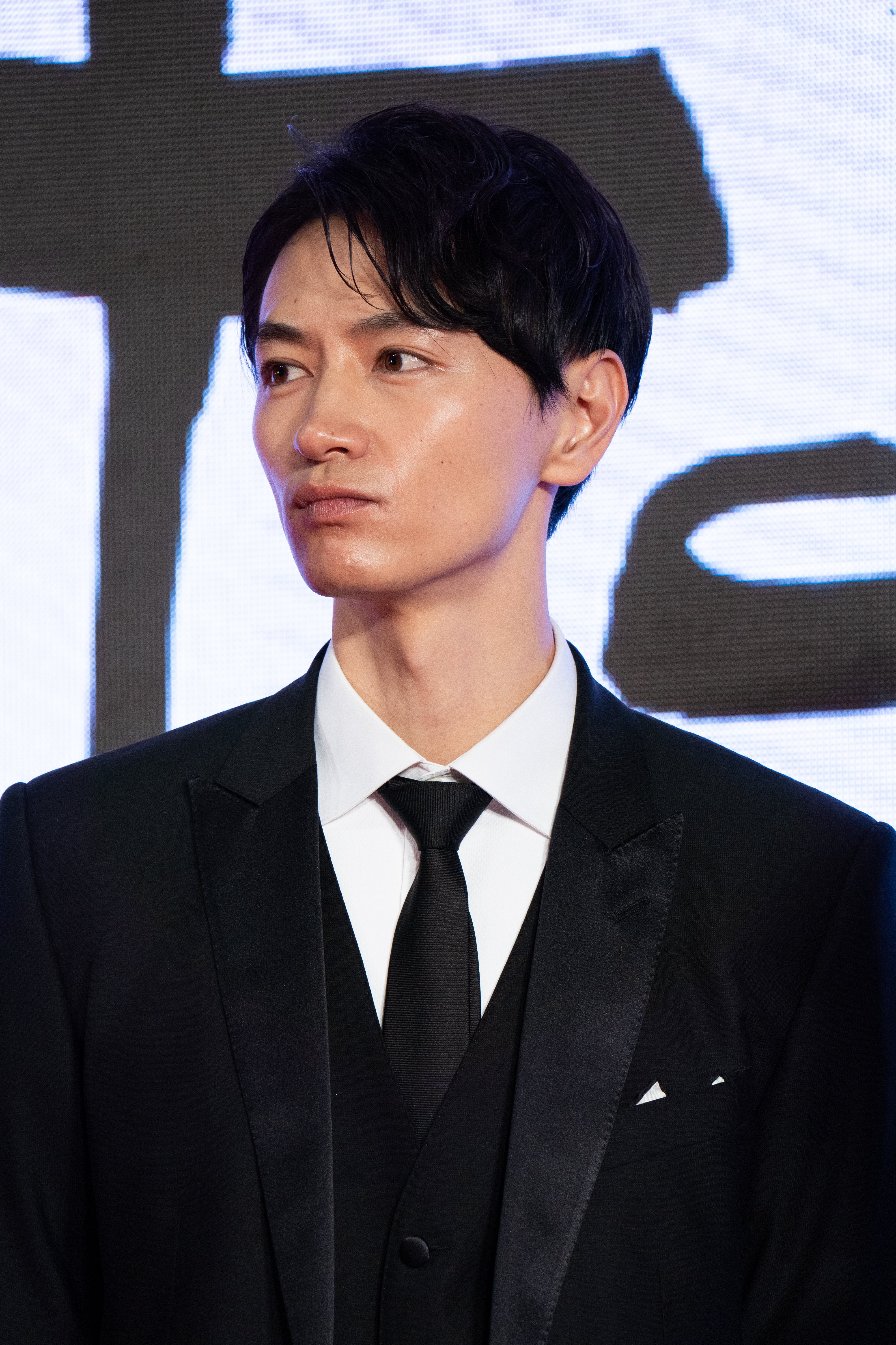 第32回 東京国際映画祭 オープニングセレモニー 細田善彦 (海辺の映画館―キネマの玉手箱)